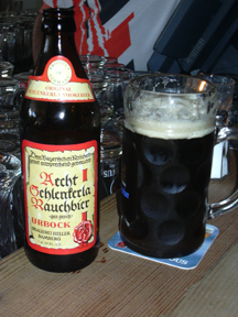 Aecht Schlenkerla Rauchbier - Urbock - smoke beer, bottle and pint.